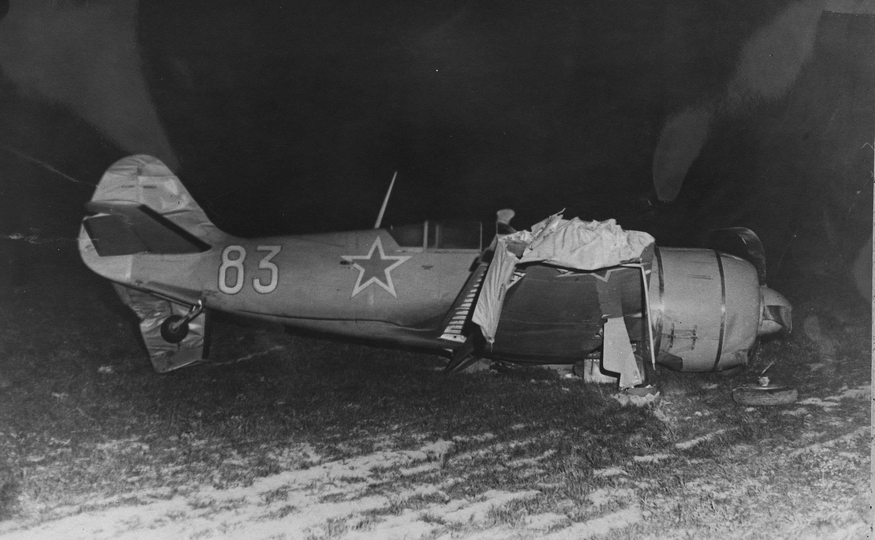 Collectie / Archief : Fotocollectie Anefo Reportage / Serie : [ onbekend ] Beschrijving : Russische jager in Zweden (gevluchte piloot) Datum : 22 mei 1949 Locatie : Zweden Trefwoorden : RUSSISCHE, jagers, piloten Fotograaf : Fotograaf Onbekend / Anefo Auteursrechthebbende : Nationaal Archief Materiaalsoort : Glasnegatief Nummer archiefinventaris : bekijk toegang 2.24.01.09 Bestanddeelnummer : 903-3907